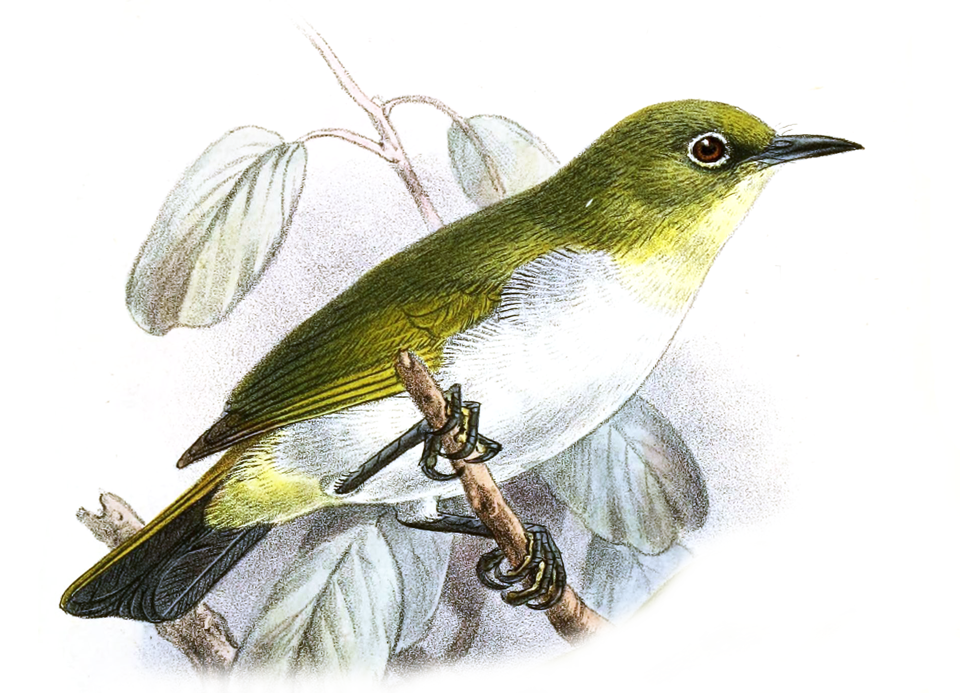 Zosterops metcalfii